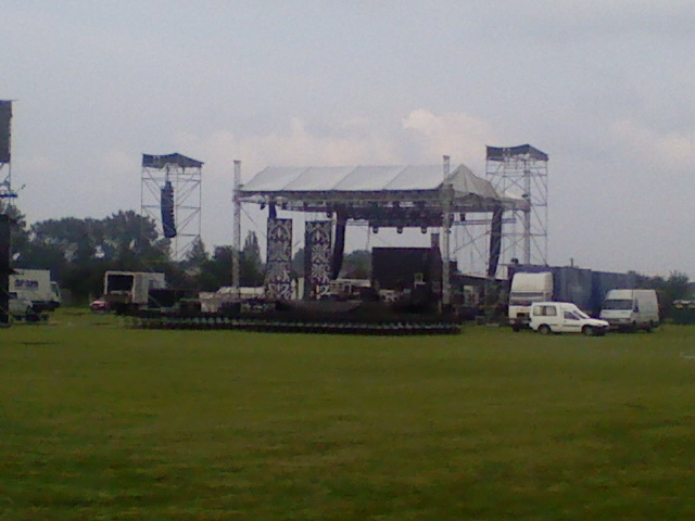 Międzynarodowy Festiwal Piosenki i Kultury Romów Glinojeck 2011 - przygotowania